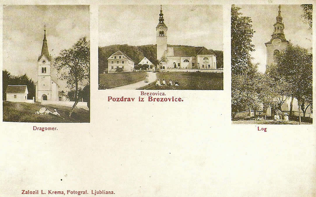 Razglednica Dragomerja.